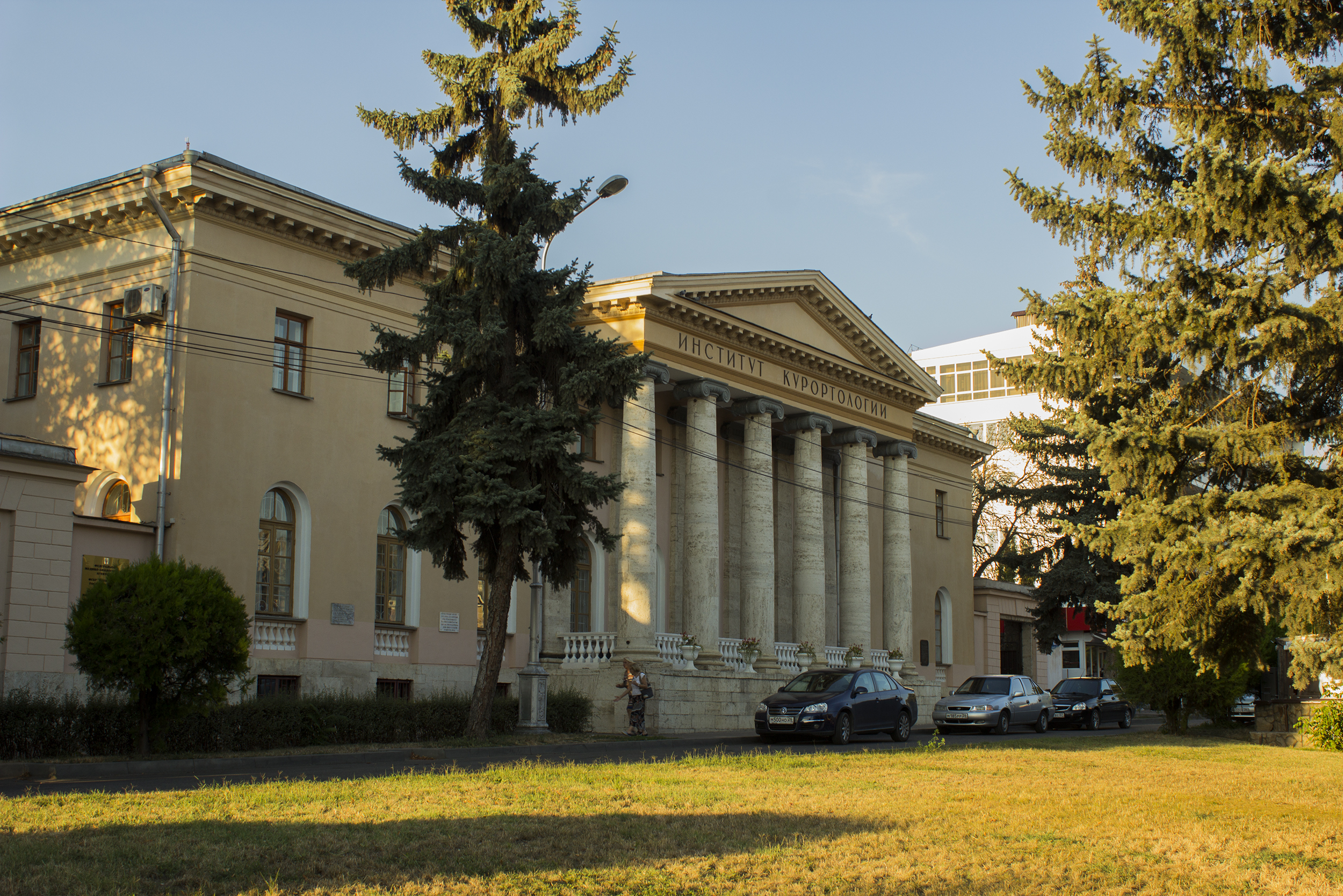 Ресторация: улица Кирова, 30, Пятигорск, Ставропольский край